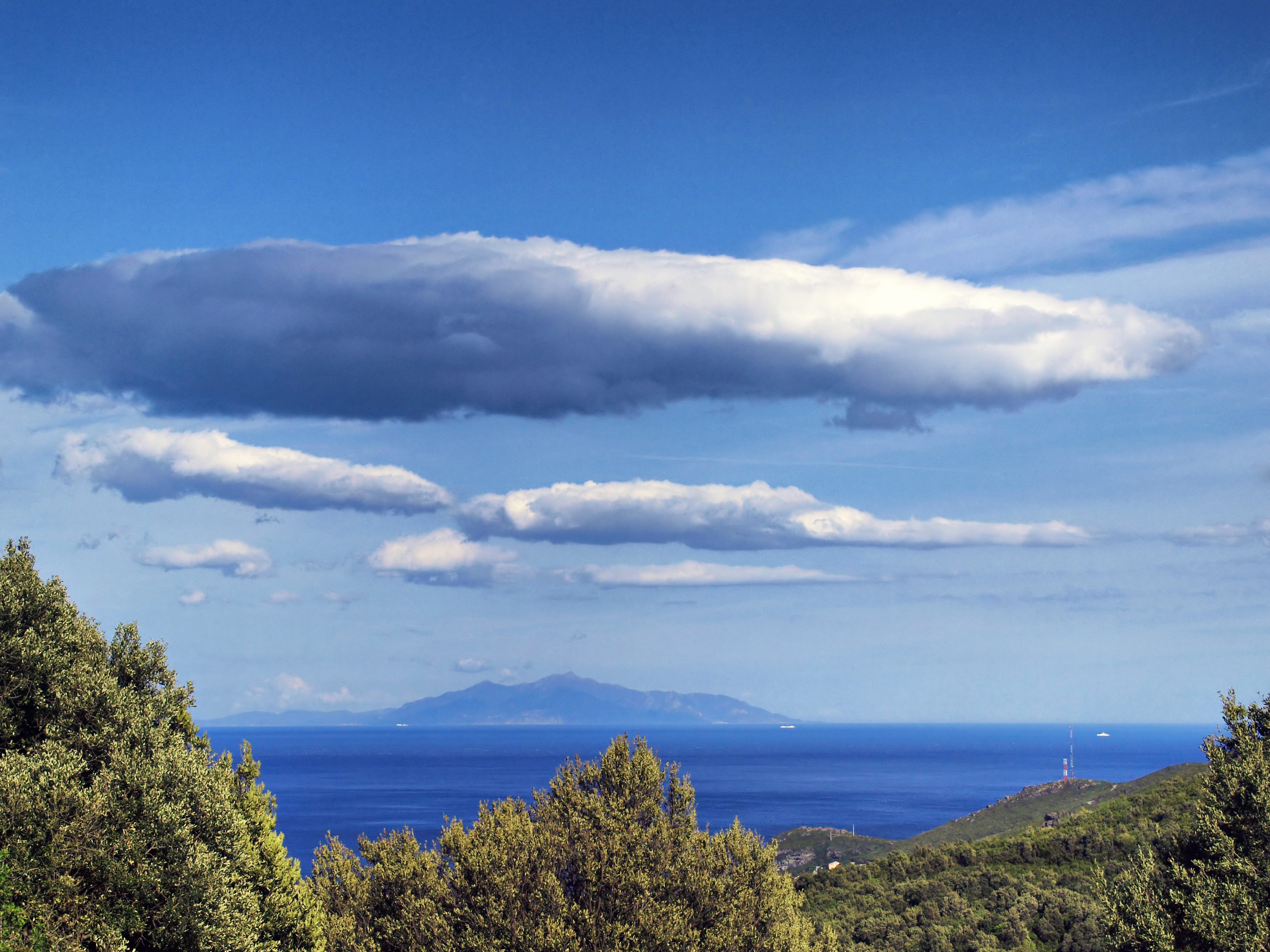 Sisco, Cap Corse (Corse) - Vue de l'île d'Elbe depuis Sant' Antone